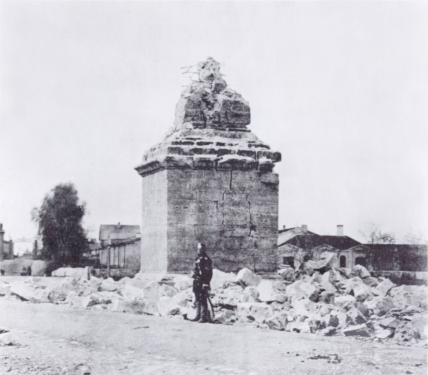 Разрушенный обелиск Коннетабля